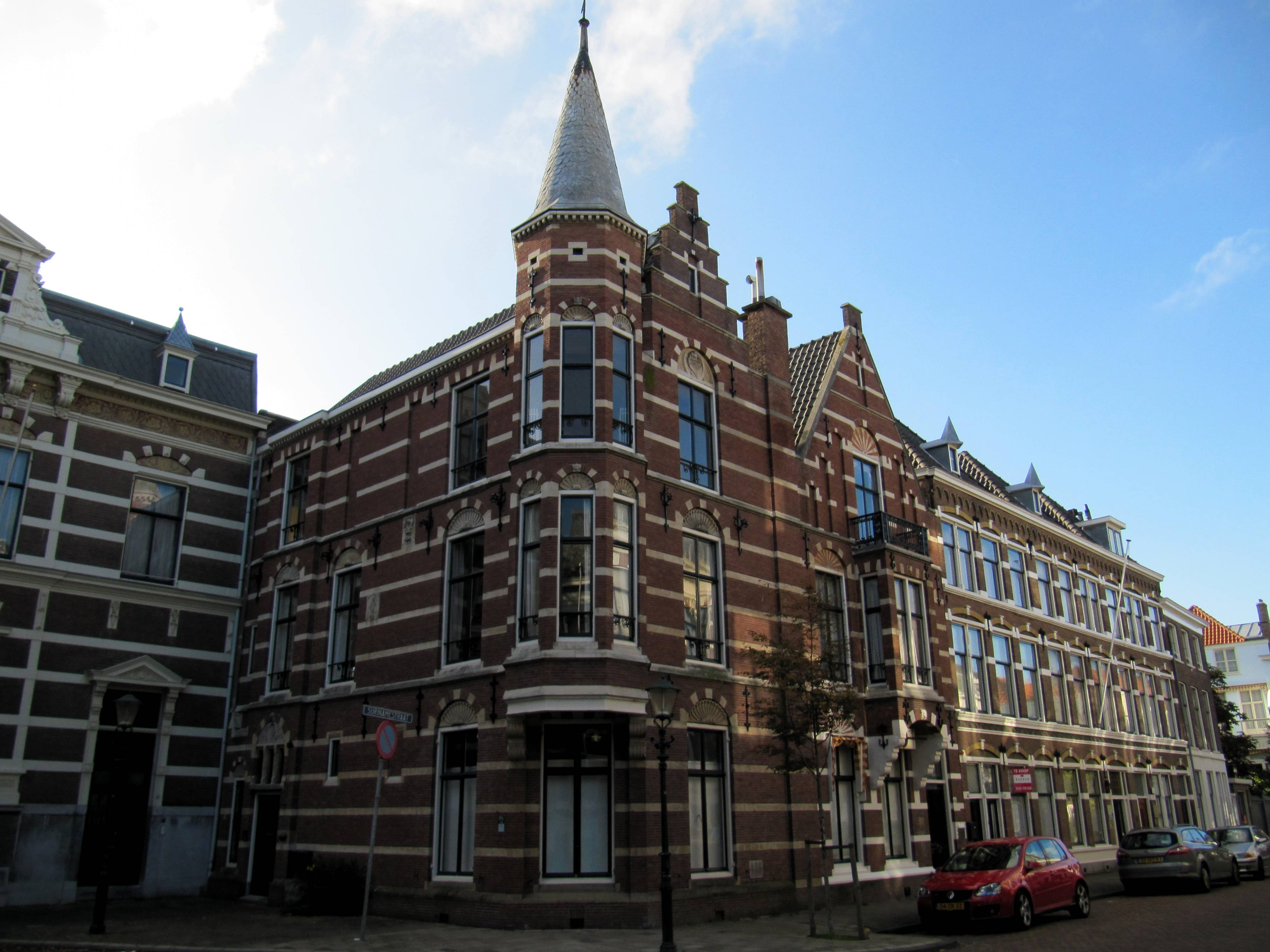 Den Haag Surinamestraat 42 - Hoekpand tussen het brede en smalle deel van de Surinamestraat, gebouwd in 1880-1881 door rijksbouwmeester C.H. Peters als woonhuis voor hemzelf, in neo-renaissance stijl.